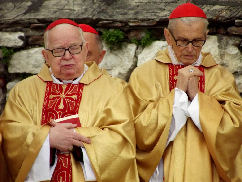 Zdjęcie zrobione podczas tradycyjnej procesji z Wawelu na Skałkę w Krakowie.